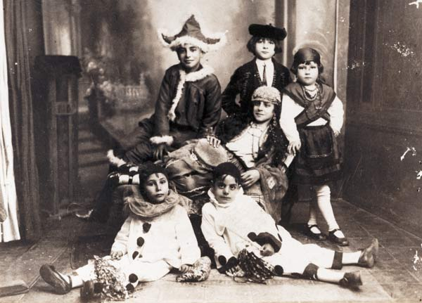 Niños disfrazados en el Carnaval de Huelva. Siglo XIX.